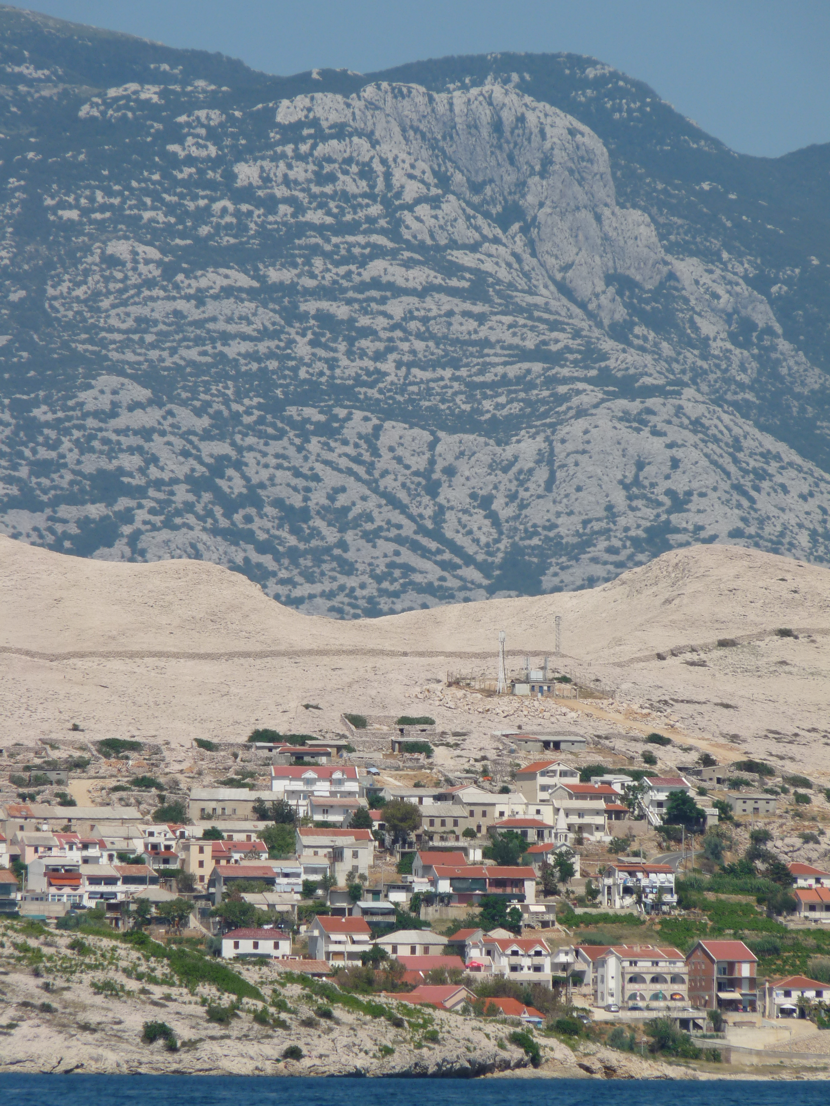 Vrsi su općina u Zadarska, Hrvatskoj.